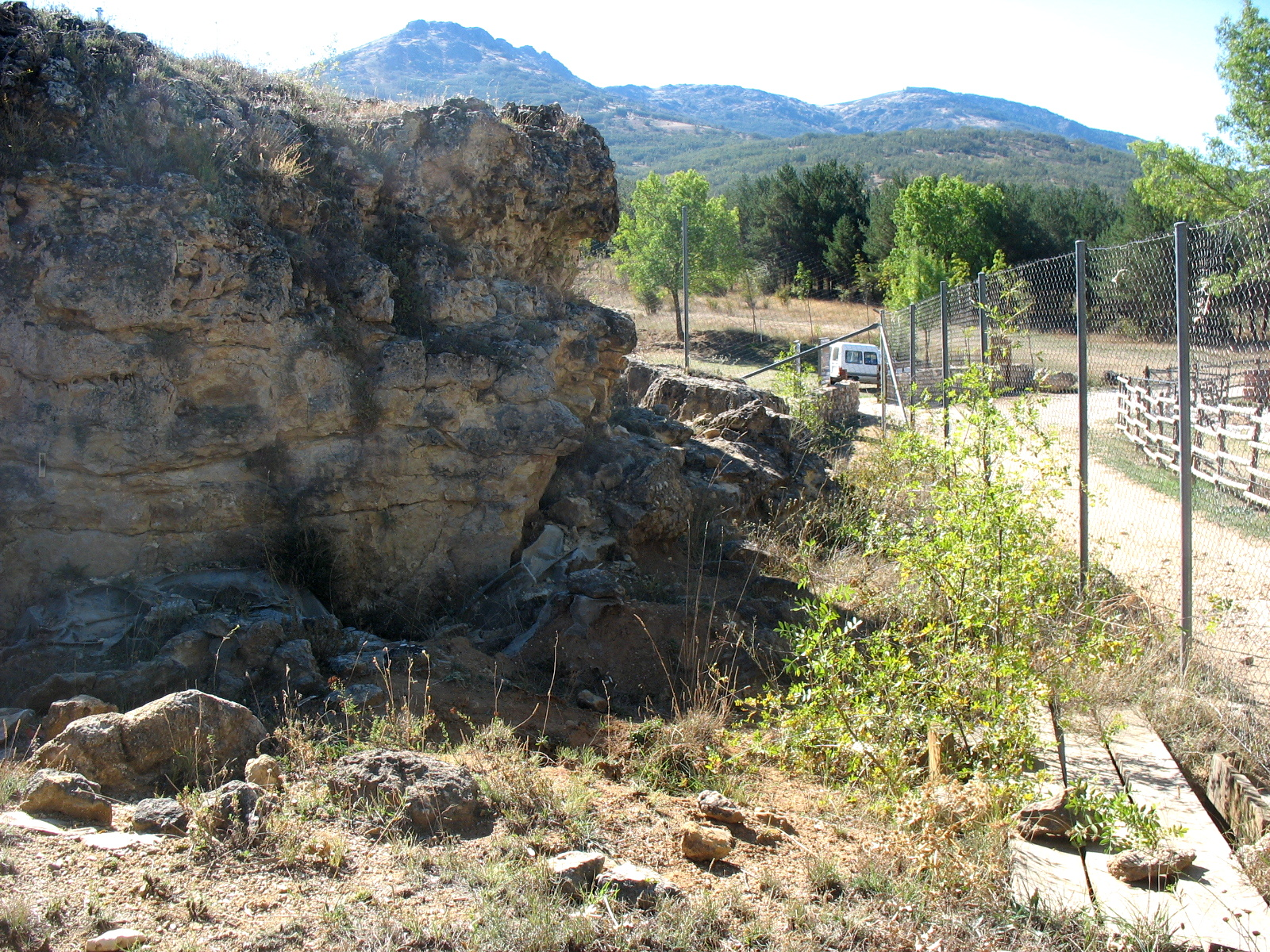 Cueva del Camino Pinilla del Valle, Madrid, España.